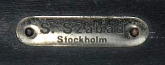 Szabad-kameran skylt